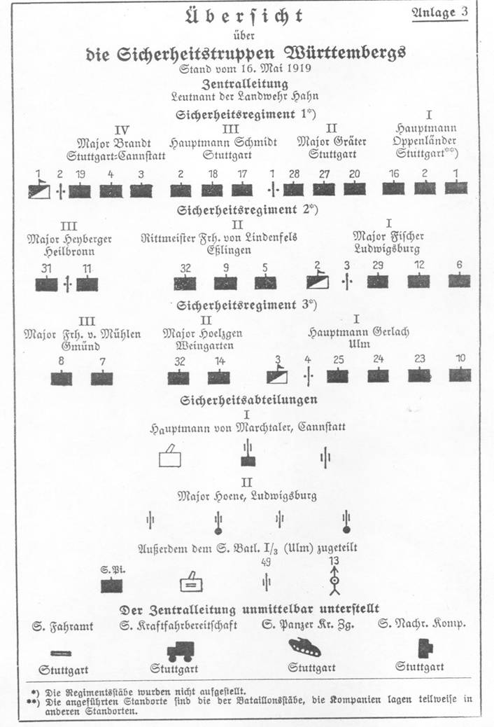 Gliederung der Sicherheitstruppen des Freien Volksstaates Württemberg 1919